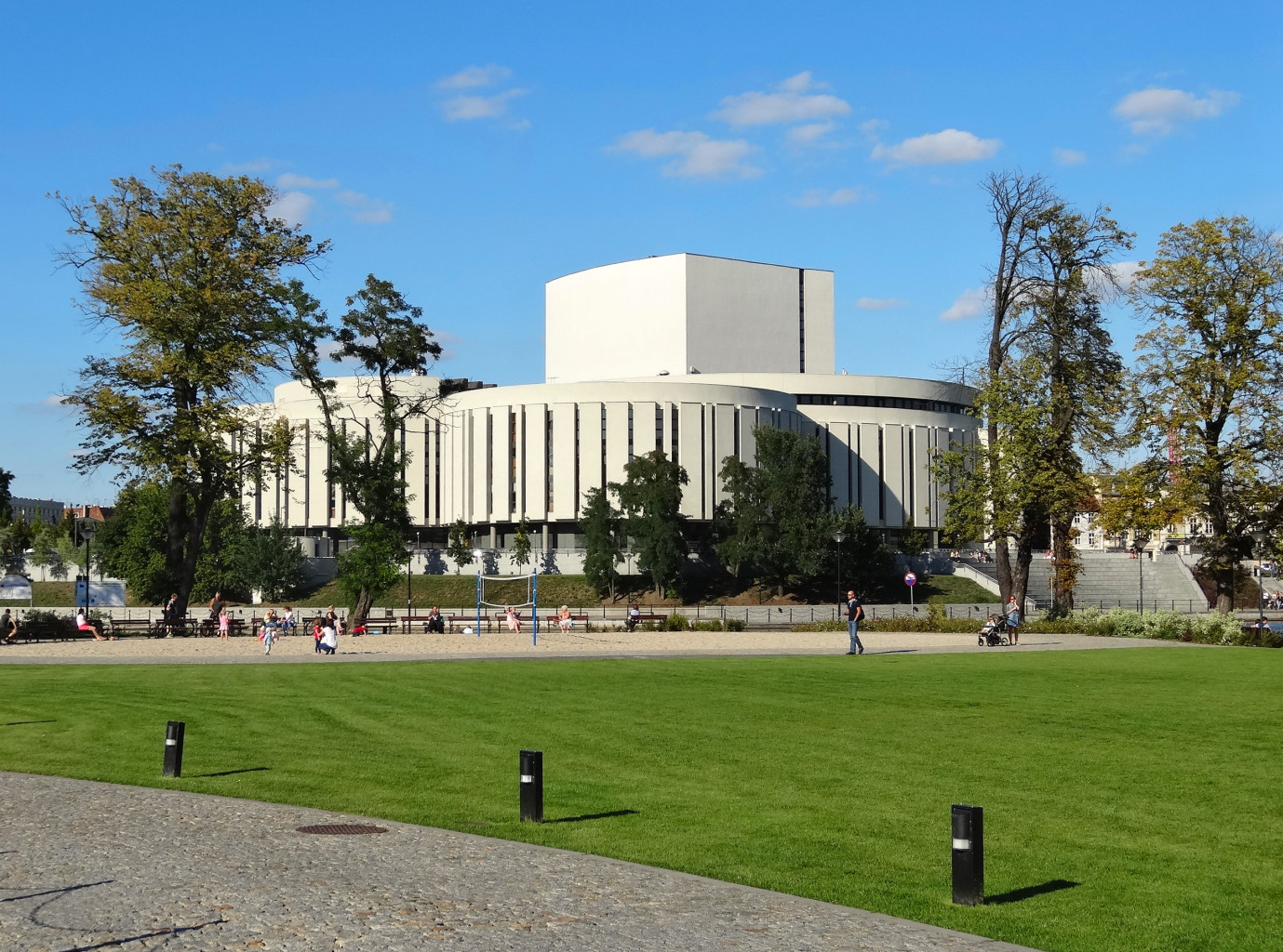 Łąka rekreacyjna na Wyspie Młyńskiej w Bydgoszczy. W tle Opera Nova.